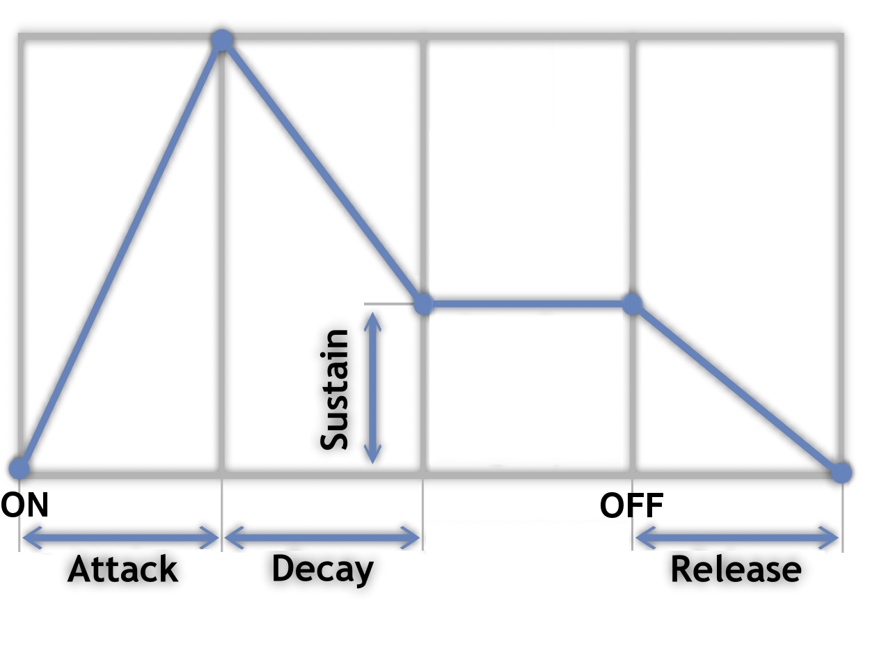 ADSR Огибающая